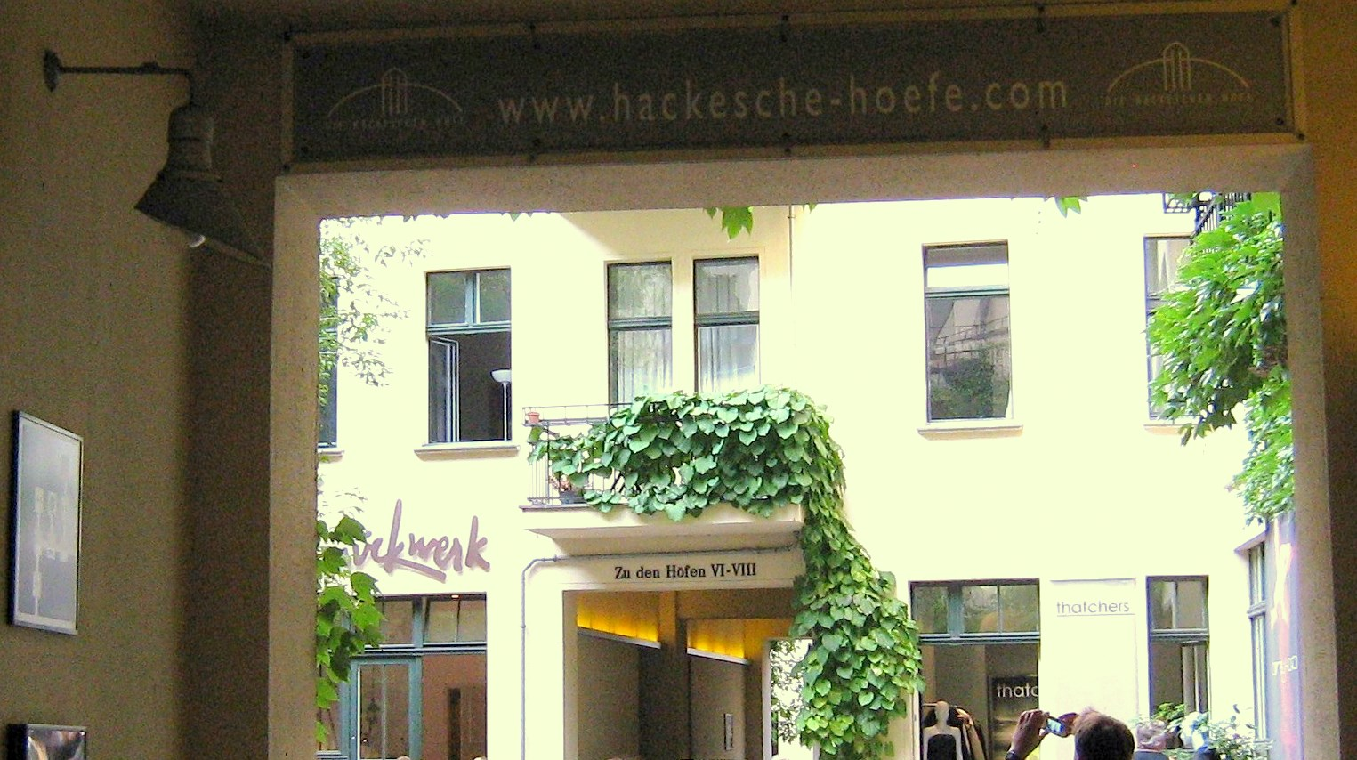 Durchgänge der Hackeschen Höfe in Berlin 2009